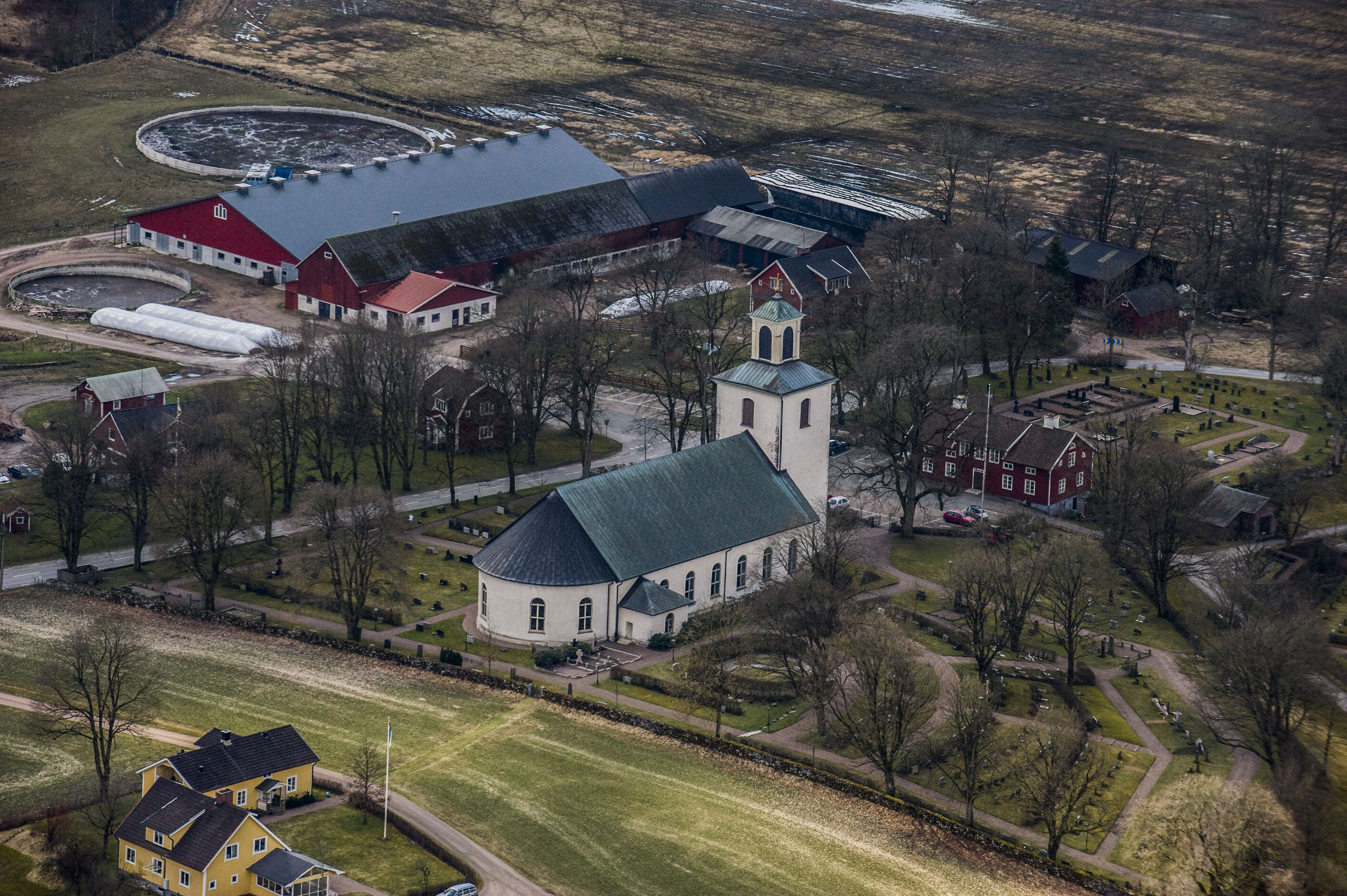 Reftele kyrka från luften